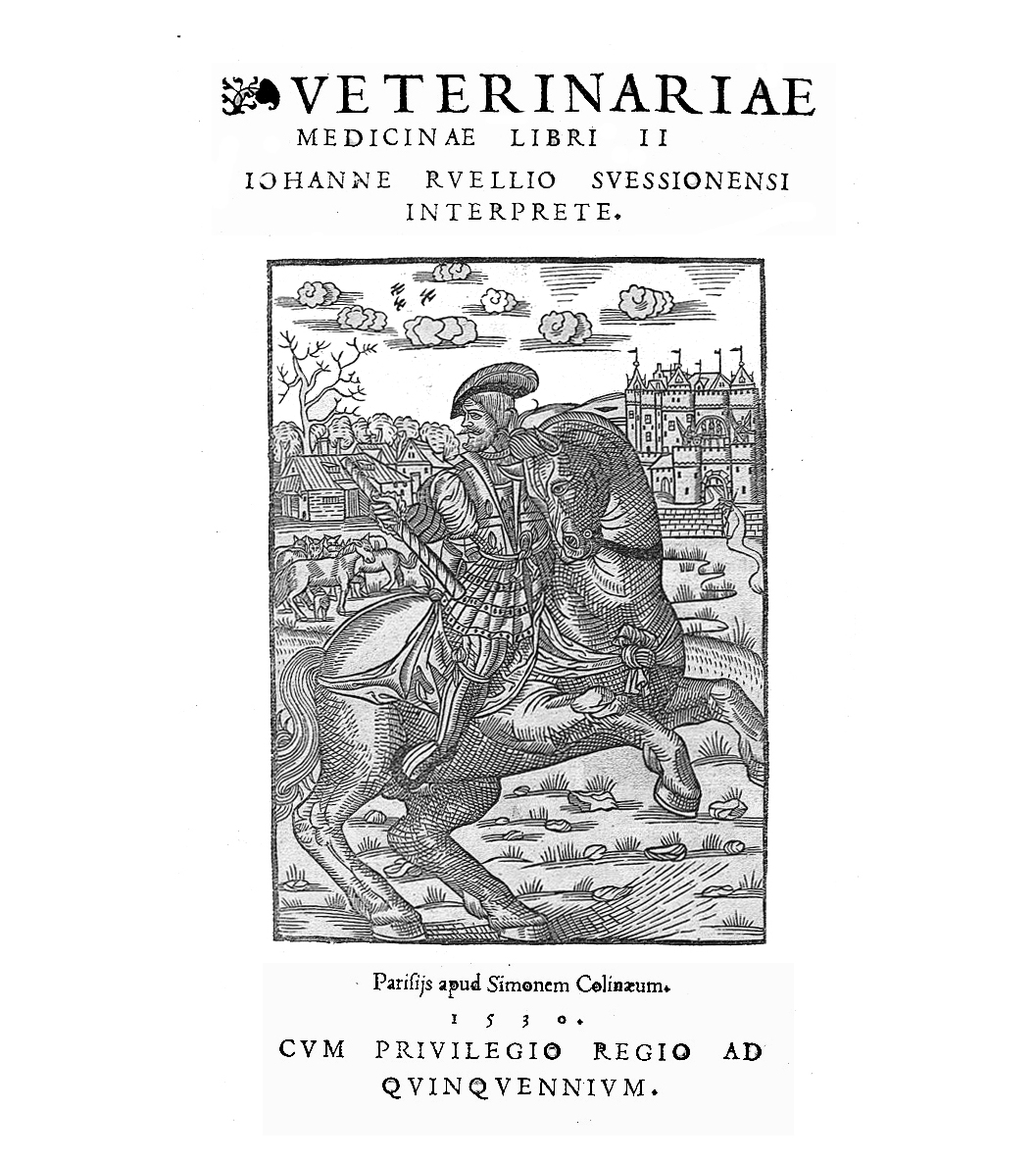 Titelblatt